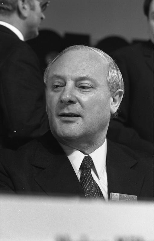 Bundesparteitag der SPD in Hannover (Georg Leber) 10.-14.4.1973